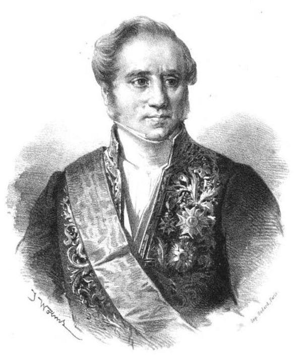 "Jacques Pierre Charles Abbatucci, Sénateur, Garde des Sceaux, Ministre de la Justice, Grand Croix de la Légion d'honneur, etc."